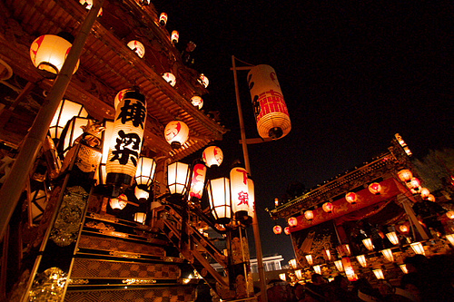 Chichibu Yomatsuri (秩父夜祭)